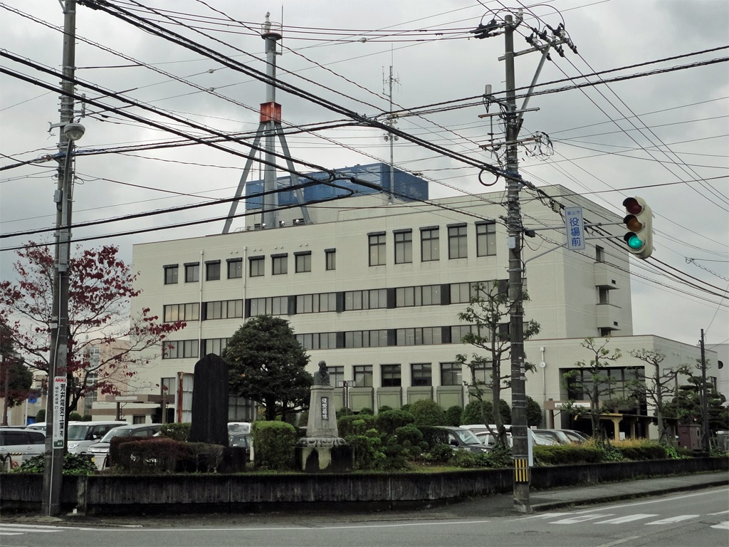 富山市婦中行政サービスセンター